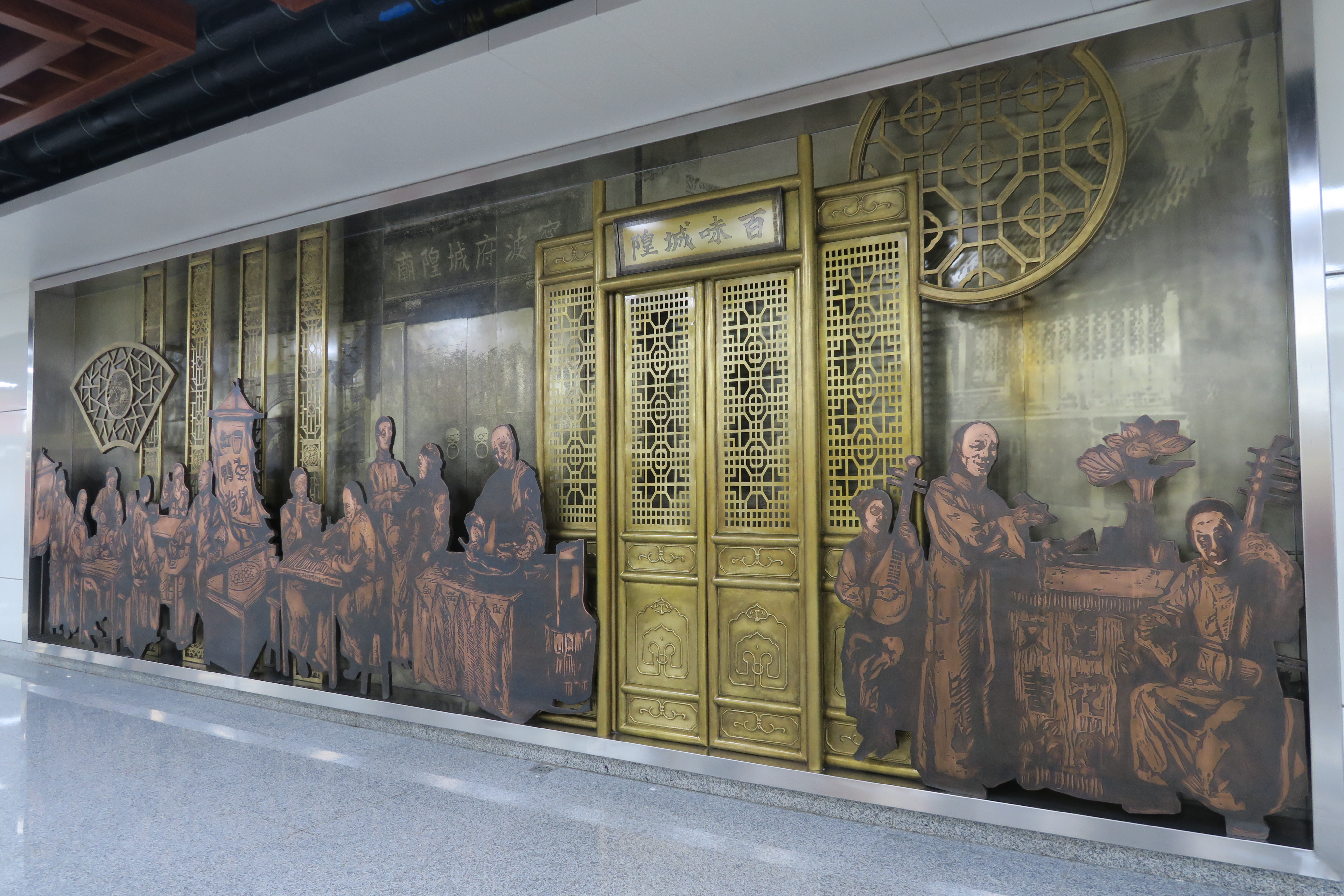 宁波地铁2号线城隍庙站